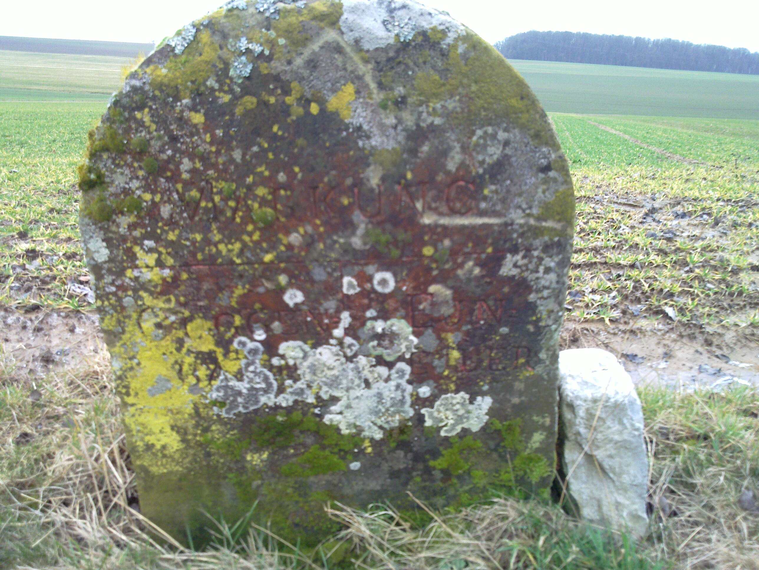 Markungsstein an der K 2364 zwischen Bauersbach und Eschental